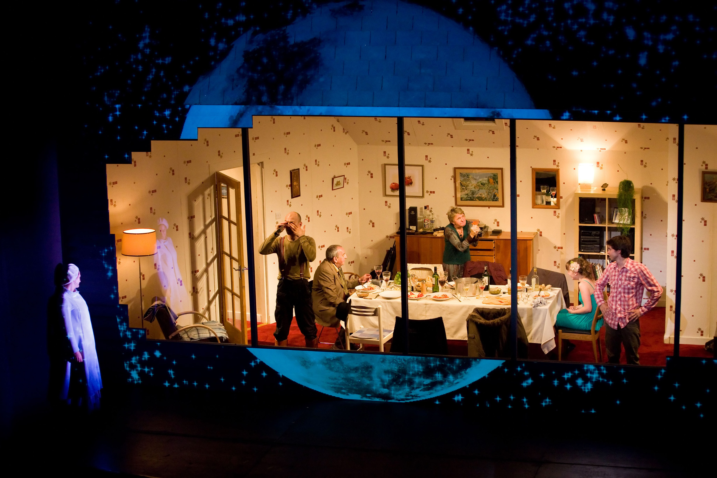 Interiors di Matthew Lenton Produzione Napoli Teatro Festival Italia e Mercadante Teatro stabile di Napoli Prova generale Teatro Sannazaro, Napoli 9 giugno 2009